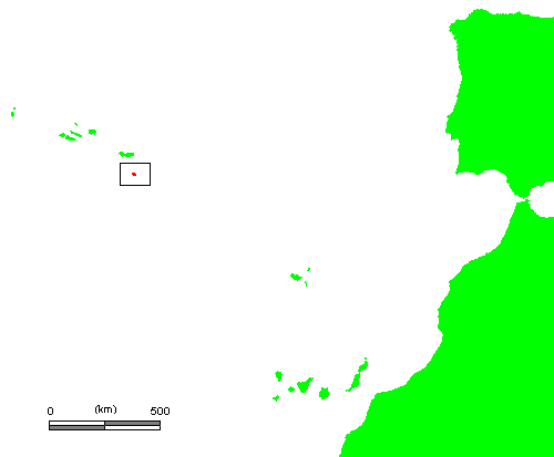 PT Santa Maria.PNG